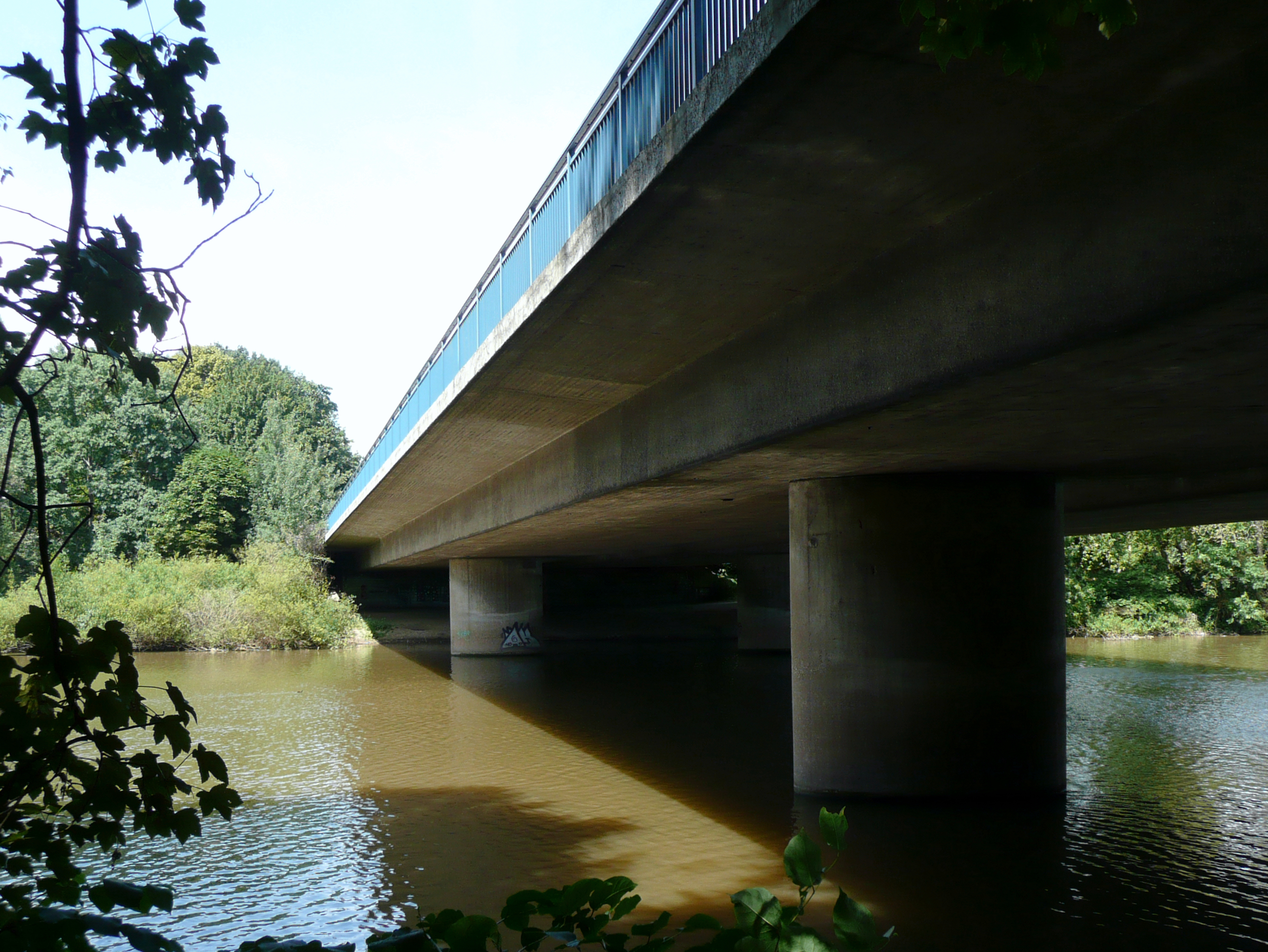 Schwanenburgbrücke